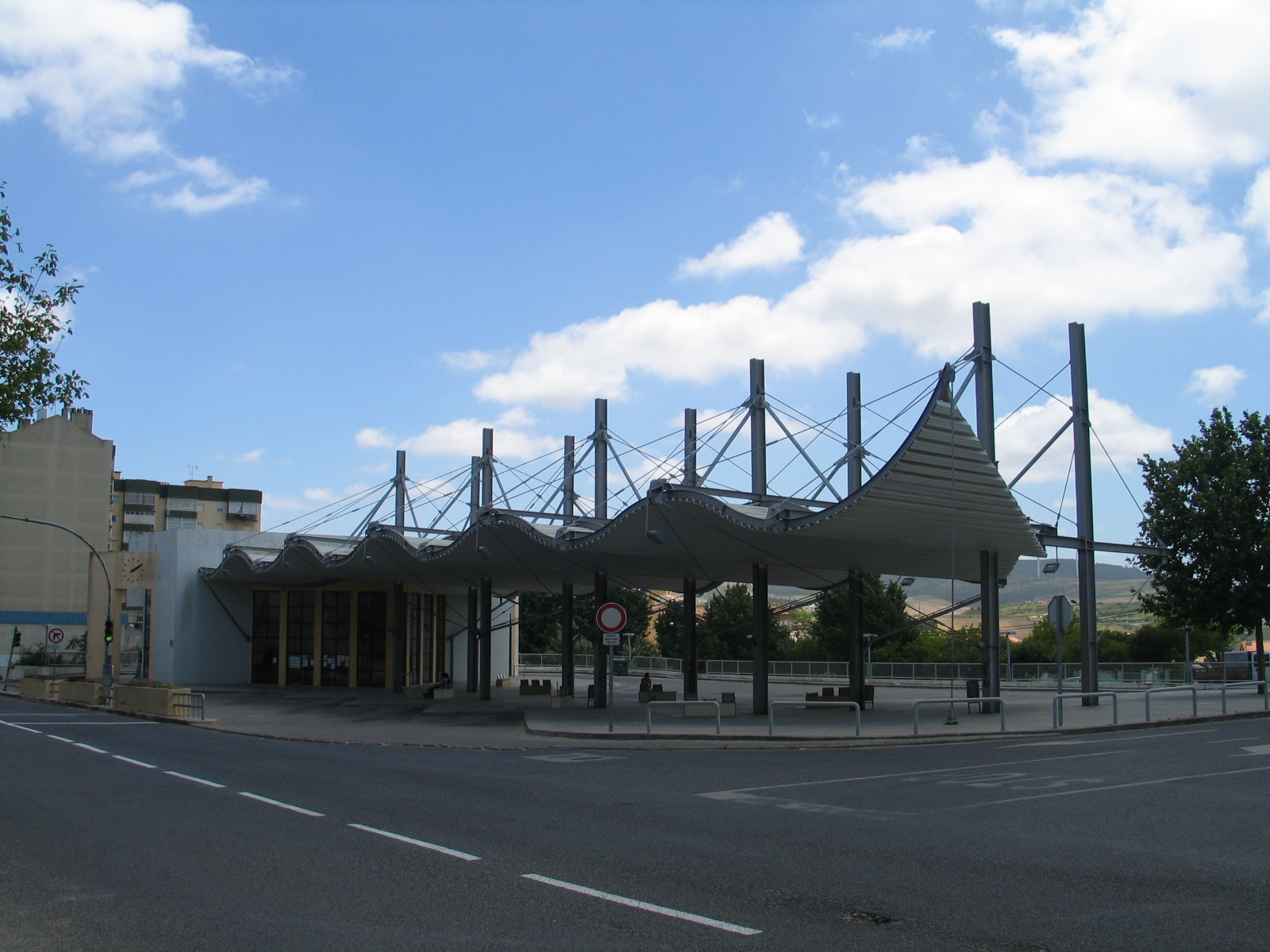 Sobral de Monte Agraço, Portugal bus station